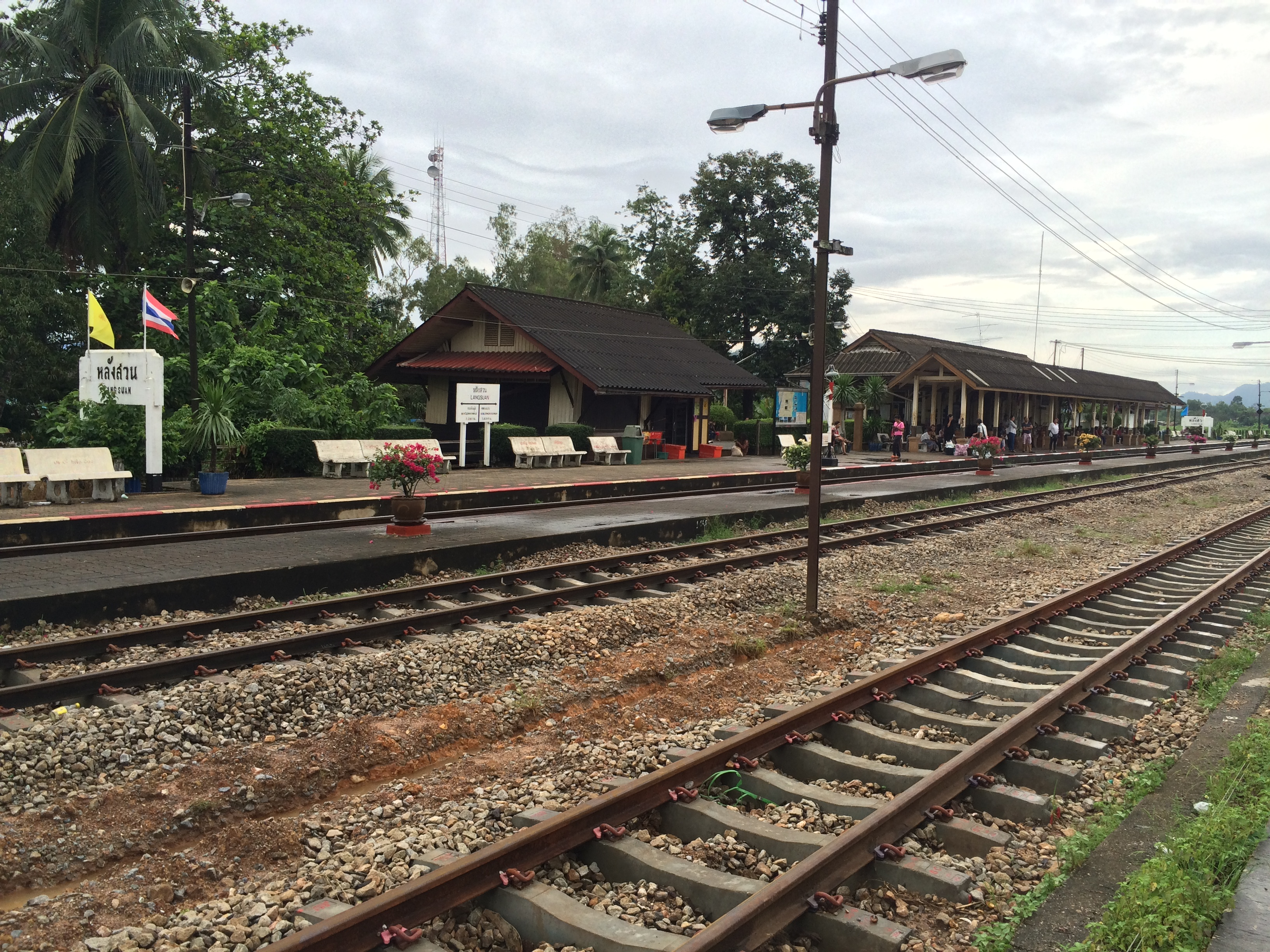 Lang Suan, Lang Suan District, Chumphon 86110, Thailand